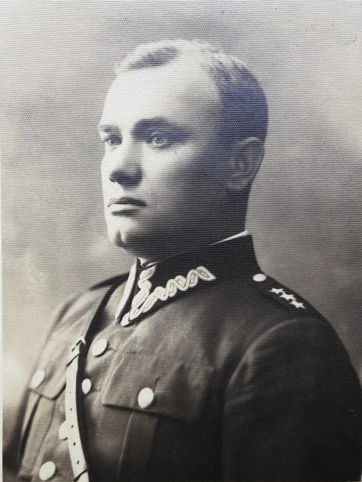 Jan Michał Nidecki w roku 1934 - kpt. n. o., wykładowca literatury polskiej i psychologii w Szkole Podchorążych dla Podoficerów w Bydgoszczy. † 1940 Katyń